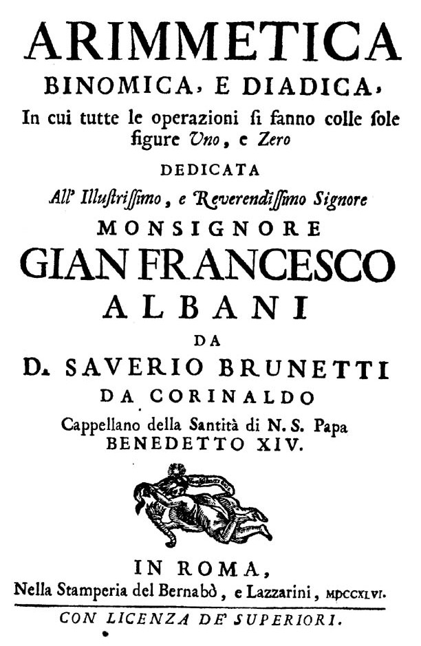 Arimmetica binomica, e diadica, in cui tutte le operazioni si fanno colle sole figure uno, e zero. - In Roma : nella stamperia del Bernabò, e Lazzarini, 1746. - 56 p. ; 4º .